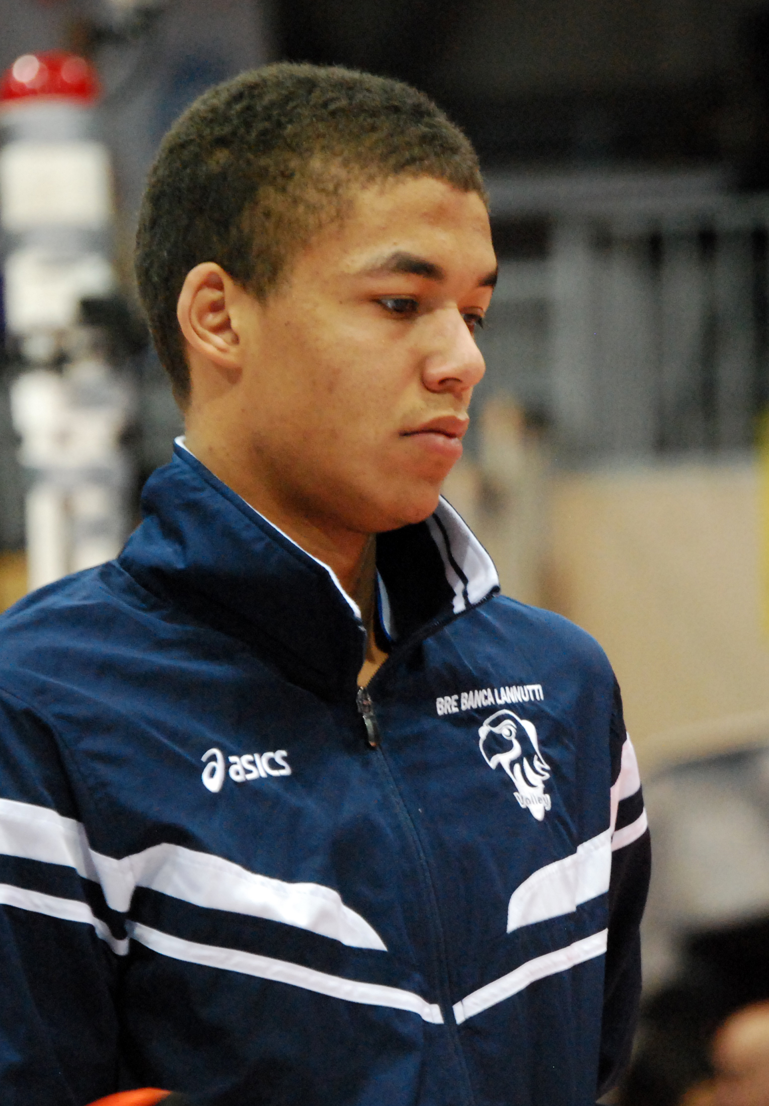 Nimir Abdel-Aziz